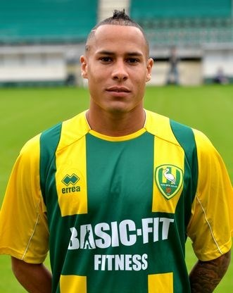 Tjaronn Chery